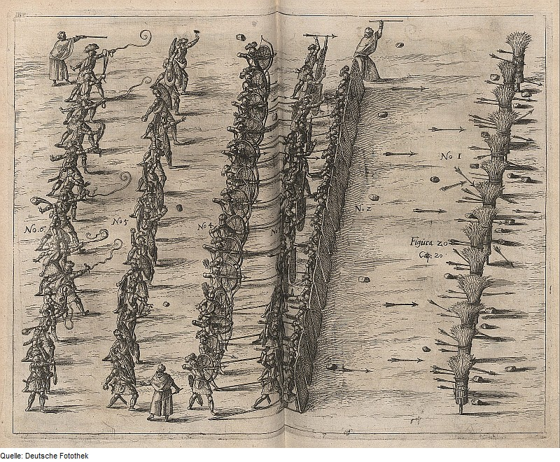 Original image description from the Deutsche Fotothek Kriegskunst & Ausbildung & Pfeil & Bogen & Stein & Schleuder & Speer